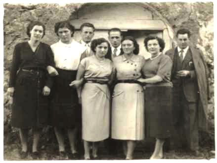 Fotos antiguas circ. 1940-50 de Riosa, Minas de Rioseco Minas prehistóricas de Texeo descubiertas por Alejandro Van Straalem y explotadas por The Aramo Cooper Minas Ltd. Principado de Asturias, España Facilitadas por Honorino Gonzalez, GRUCOMI y publicadas por Arbeyu. Febrero 2006